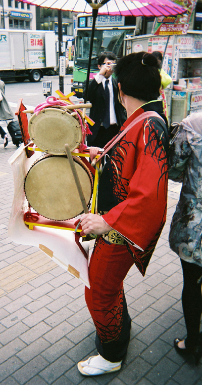 チンドン屋。高田馬場で撮影。